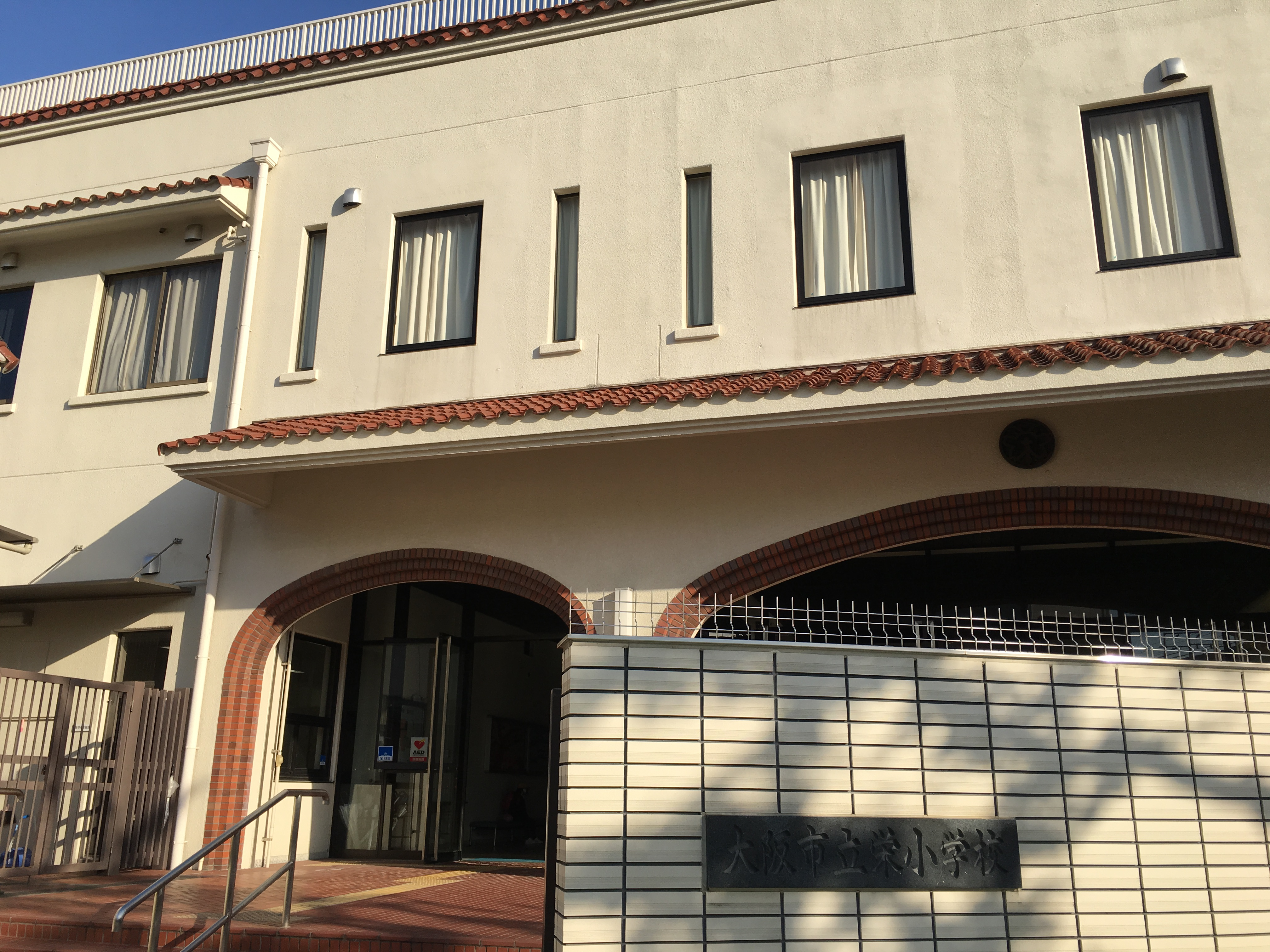 大阪市立栄小学校